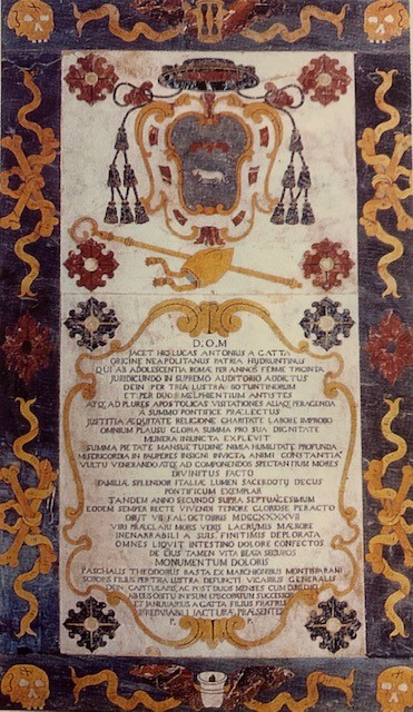 Qui giace Luca Antonio Della Gatta di Otranto, di origine Napoletana, che dall'adolescenza e per trent'anni visse a Roma.